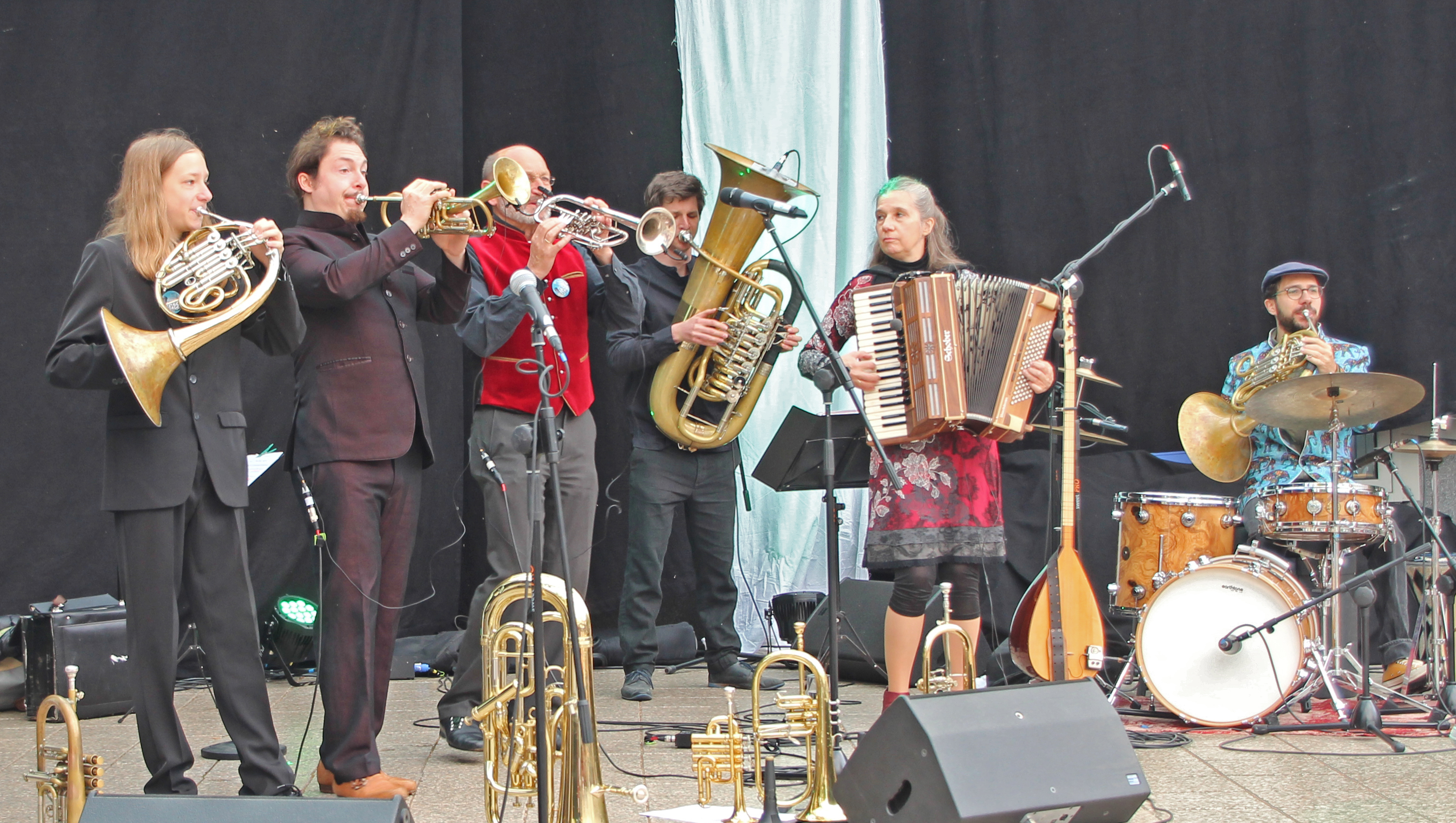 Bildinhalt: Die Unterbiberger Hofmusik bei den Jazztagen Idar-Oberstein 2017. V.l.n.r.: Franz Himpsl jr., Xaver Maria Himpsl, Franz Josef Himpsl, Florian Mayrhofer, Irene Himpsl, Ludwig Maximilian Himpsl Aufnahmeort: Idar-Oberstein, Deutschland Die dargestellten Personen wurden bei einem öffentlichen Auftritt fotografiert.